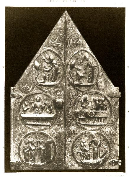 trésor de Cherves : tabernacle (Trésor de Cherves)